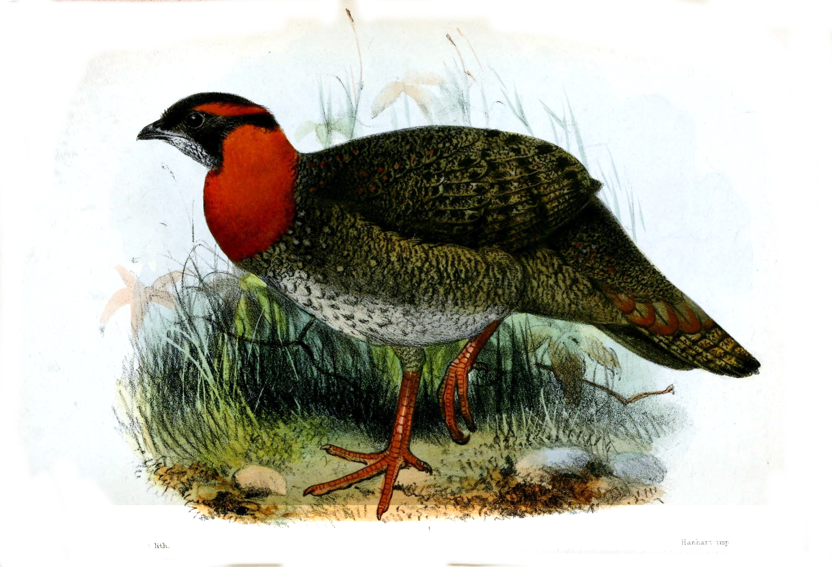 Ceriornis blythi=Tragopan blythii